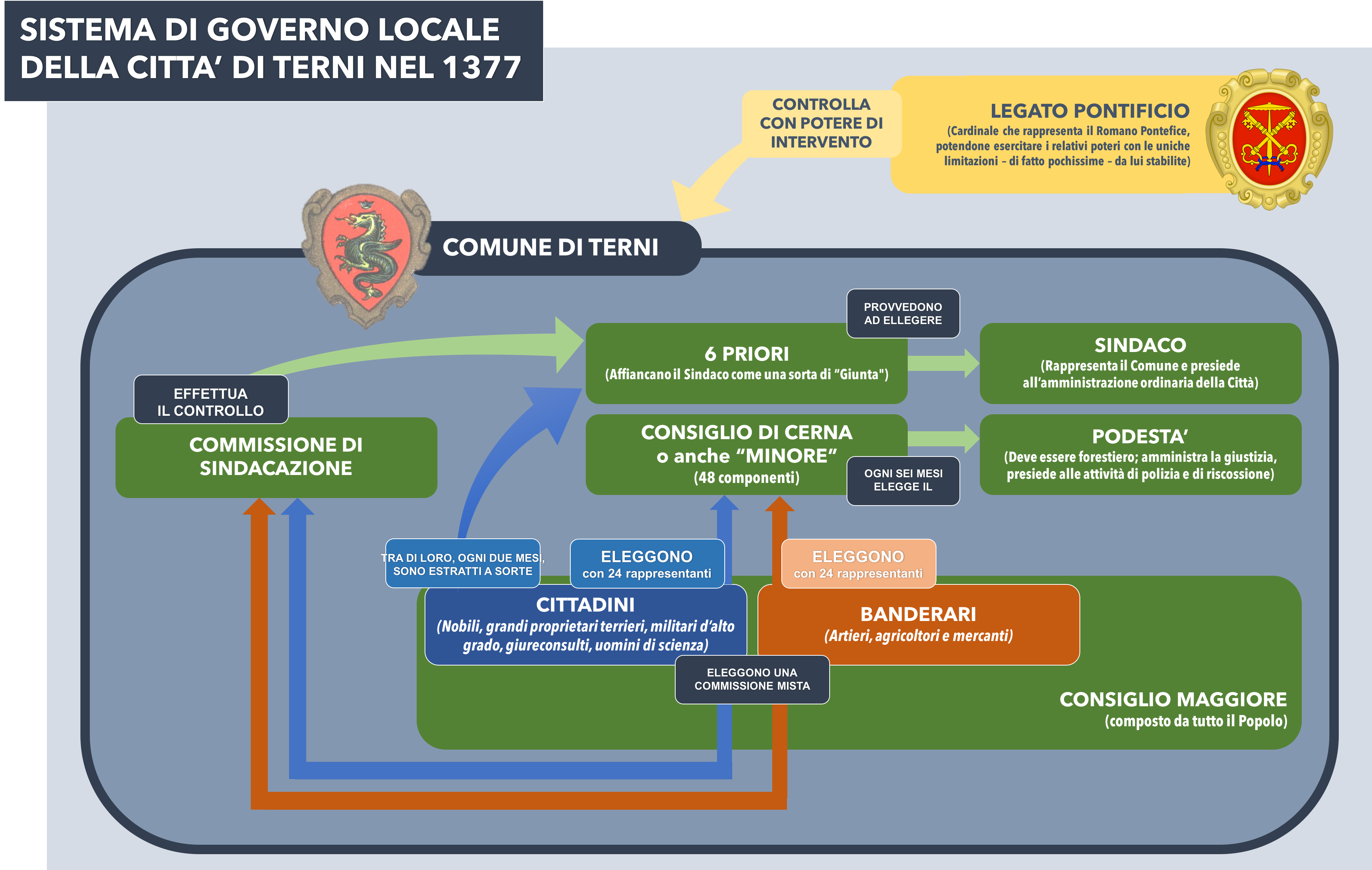 Sistema di governo del Comune di Terni in epoca medievale come risultante dai suoi statuti del 1377 (schema realizzato con il contributo determinante di elementi conoscitivi presenti nella pagina "Banderari" di Wikipedia in Italiano).